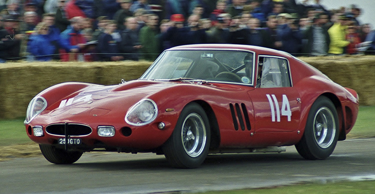 Ferrari 250GTO - 1997 GOODWOOD FESTIVAL OF SPEED